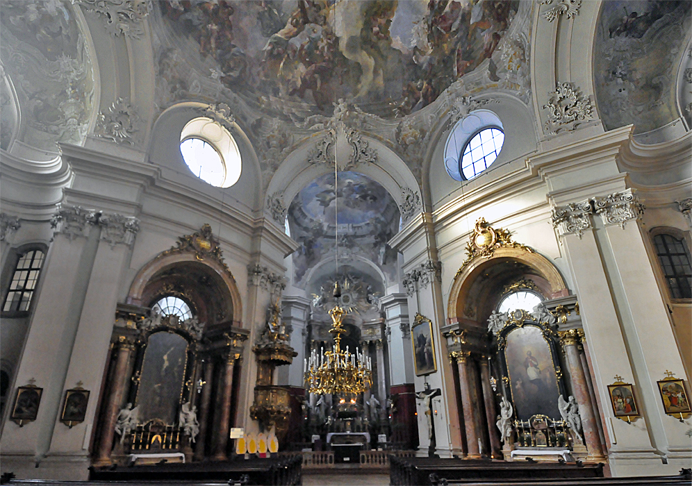 Inennansicht der Piaristenkirche Maria Treu, Wien